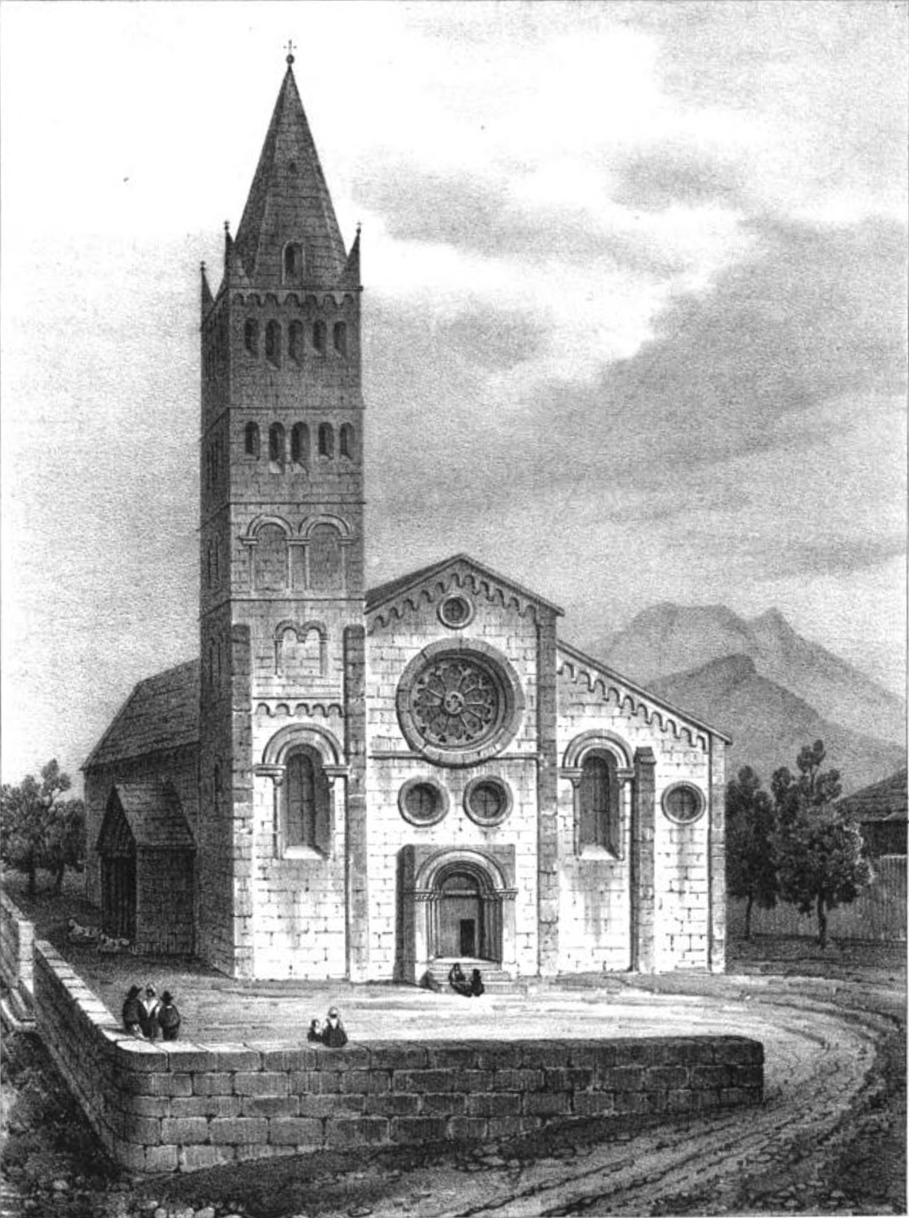 Cathédrale Notre-Dame d'Embrun, Hautes-Alpes